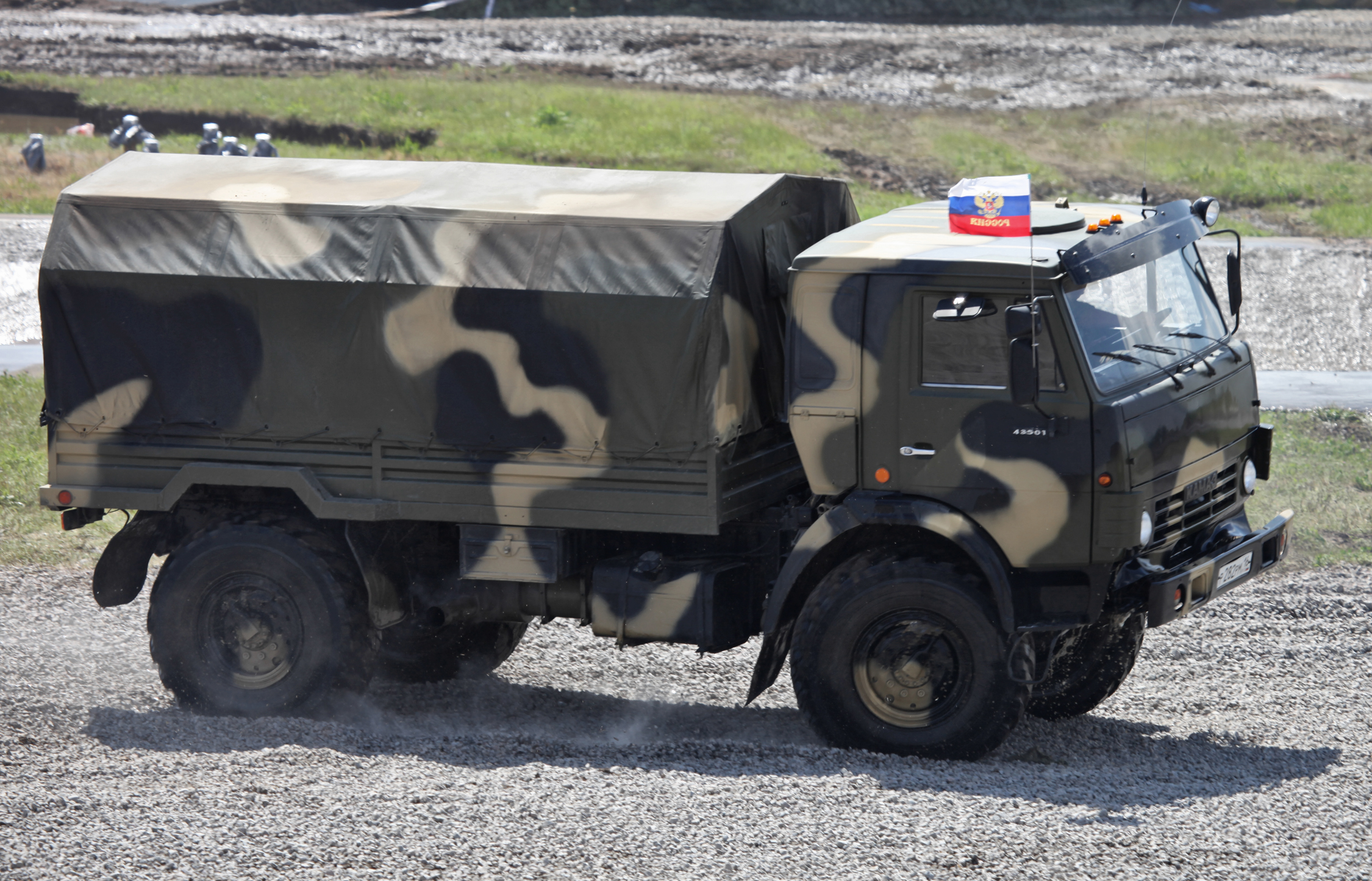 КАМАЗ-43501 (KAMAZ-43501)